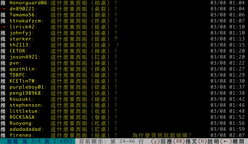 PTT的「推齊」範例